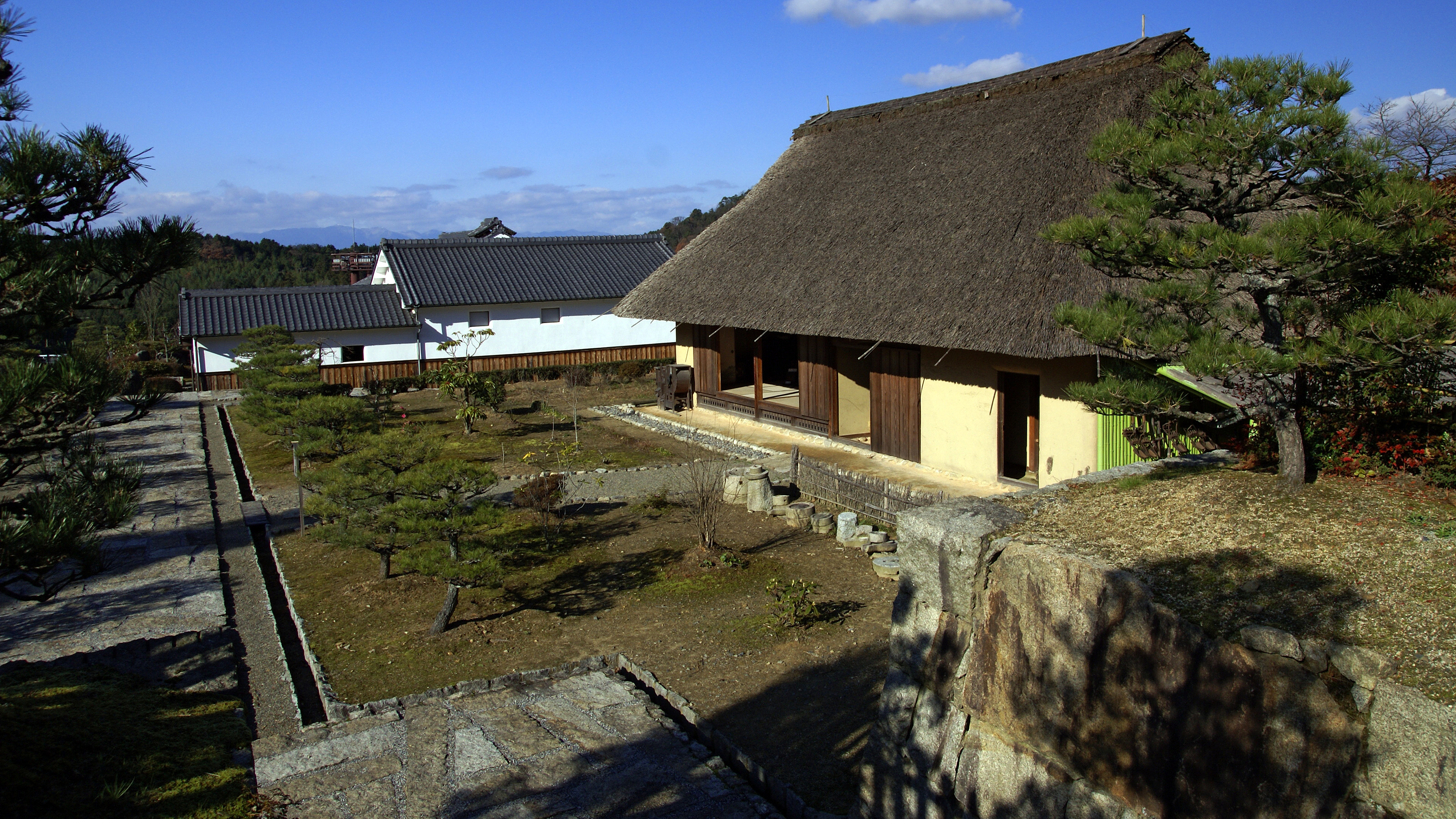 Ishibe-shukuba-no-sato in Konan, Shiga, Japan